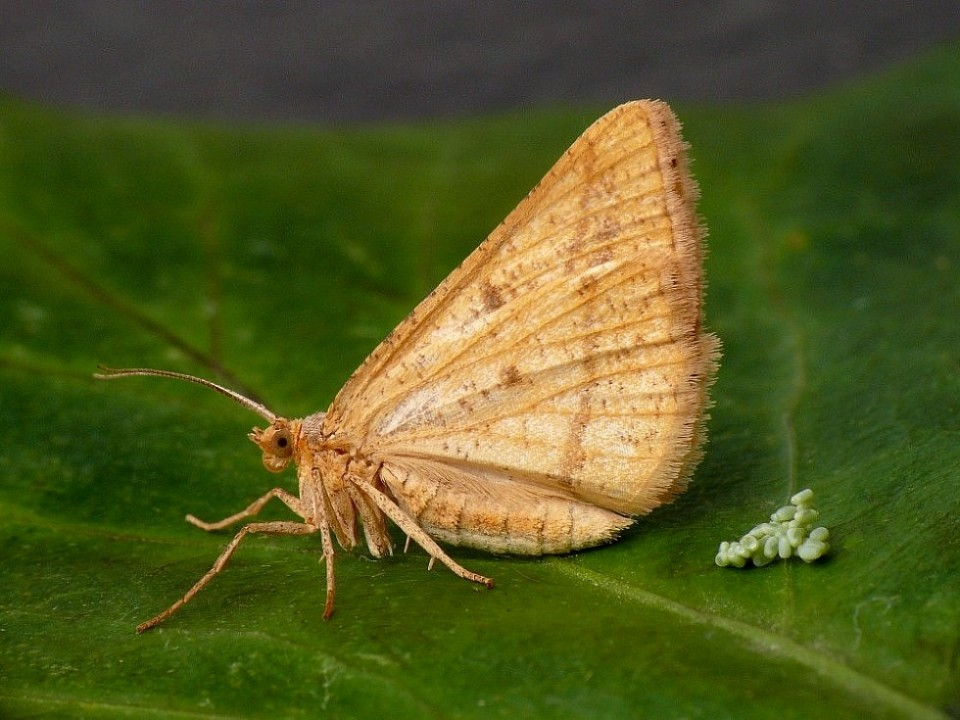 Isturgia arenacearia female & eggs